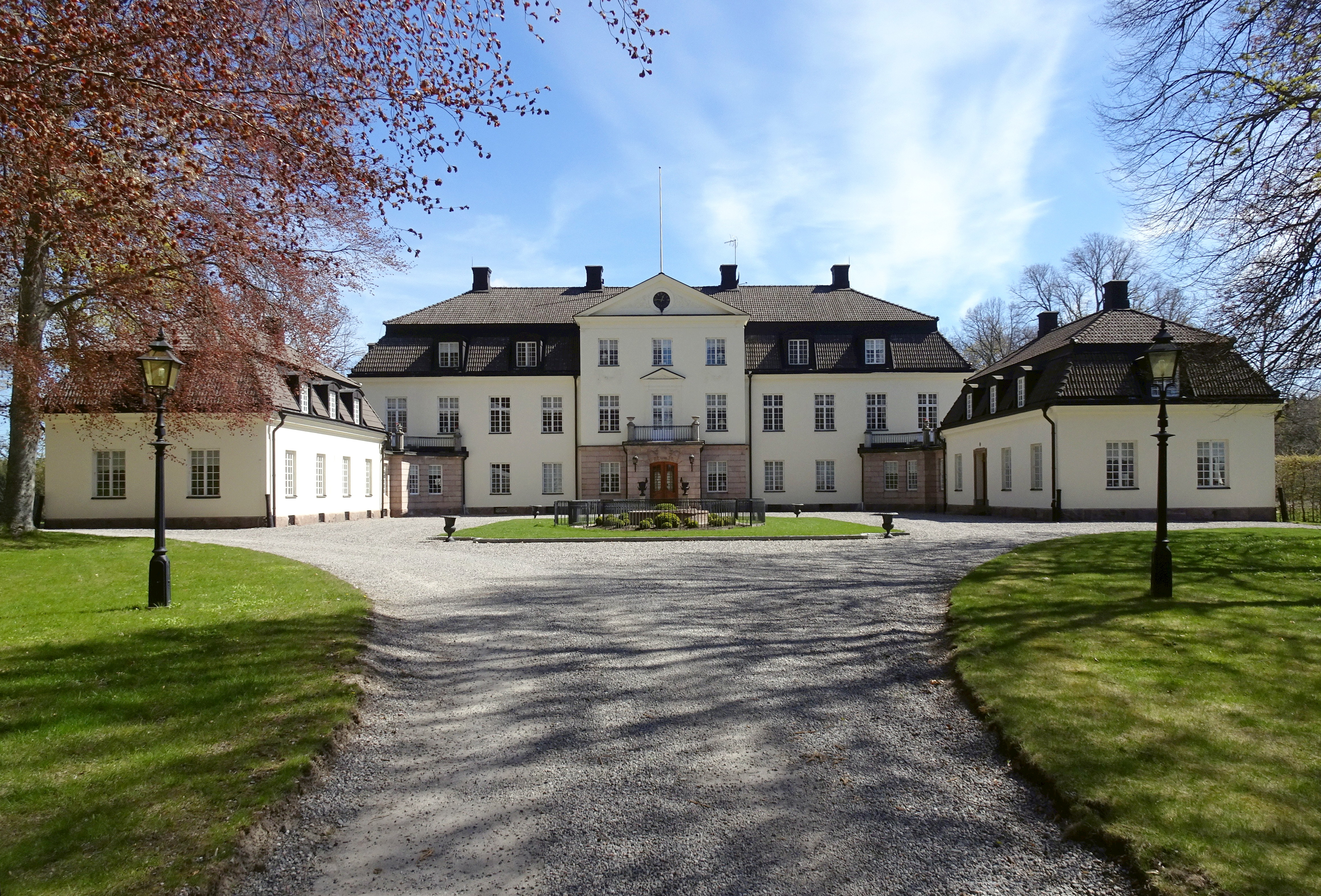 Godset Brandalsund fasad mot väster